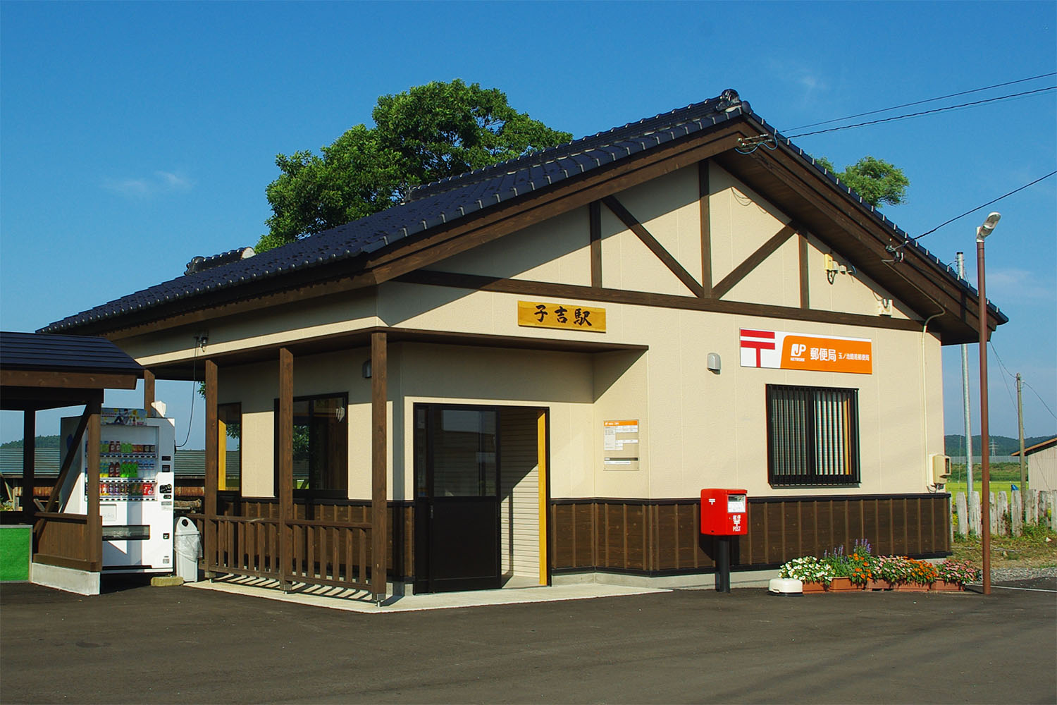 由利高原鉄道 子吉駅